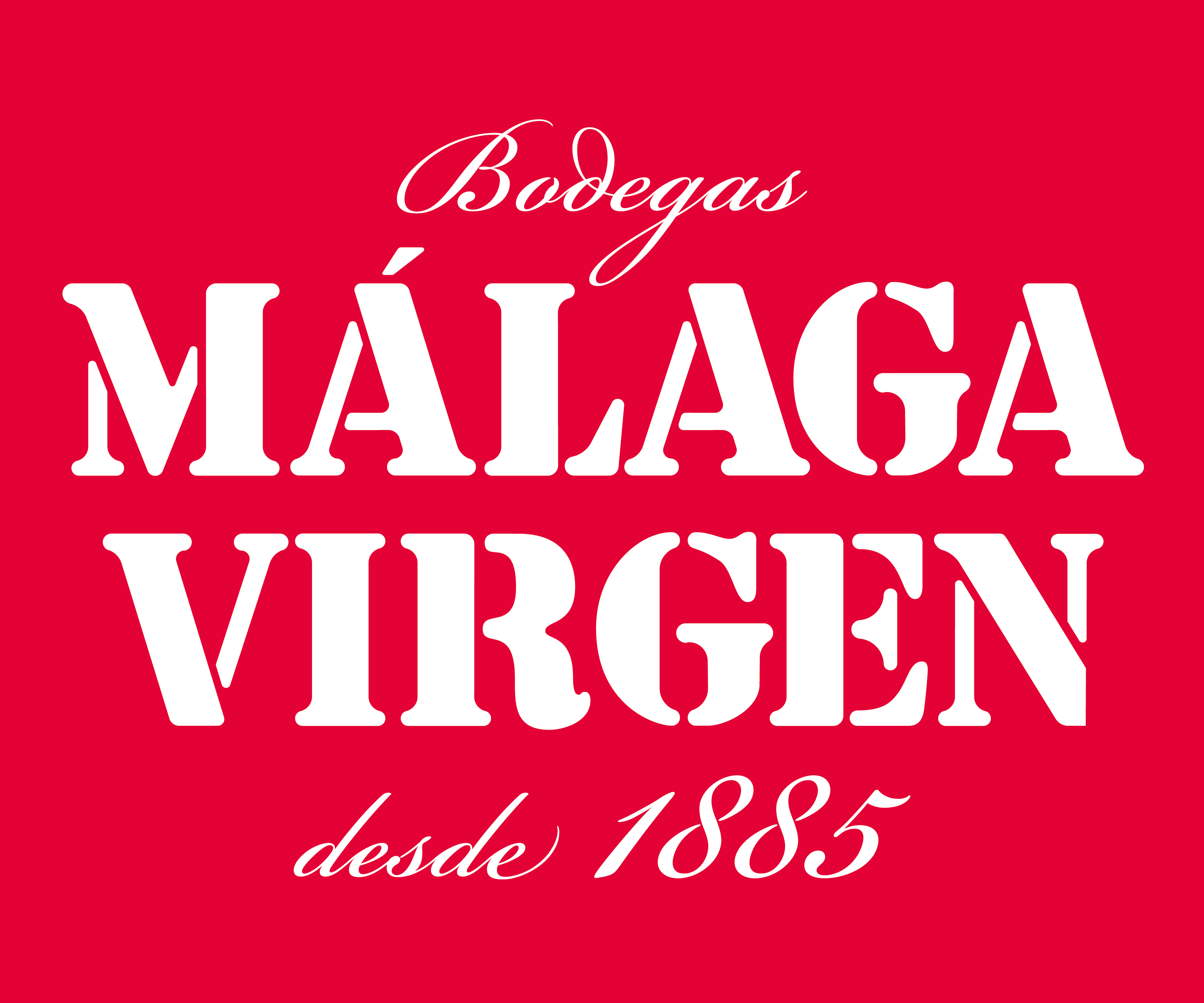 Logo actual Bodegas Málaga Virgen